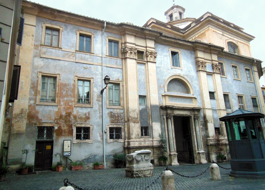 Roma, chiesa di Santa Maria della Concezione in Campo Marzio, facciata esterna